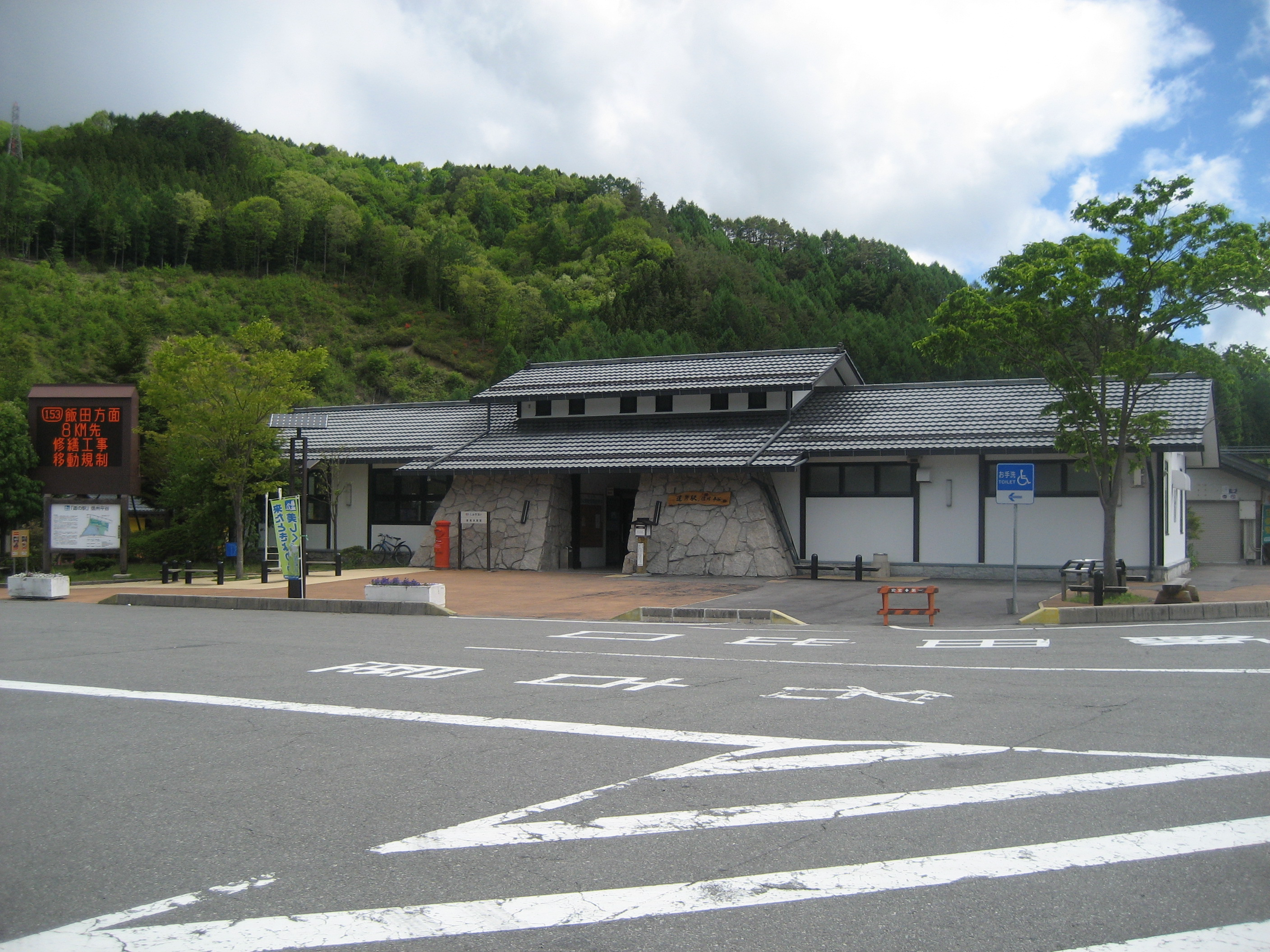 道の駅信州平谷